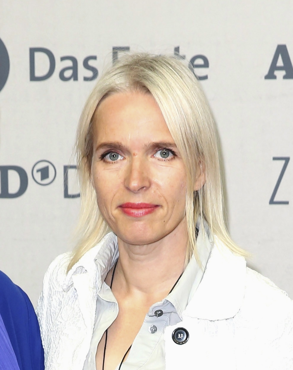 Drehbuchautorin Annette Hess bei der Premiere von 'Weissensee 3' im September 2015